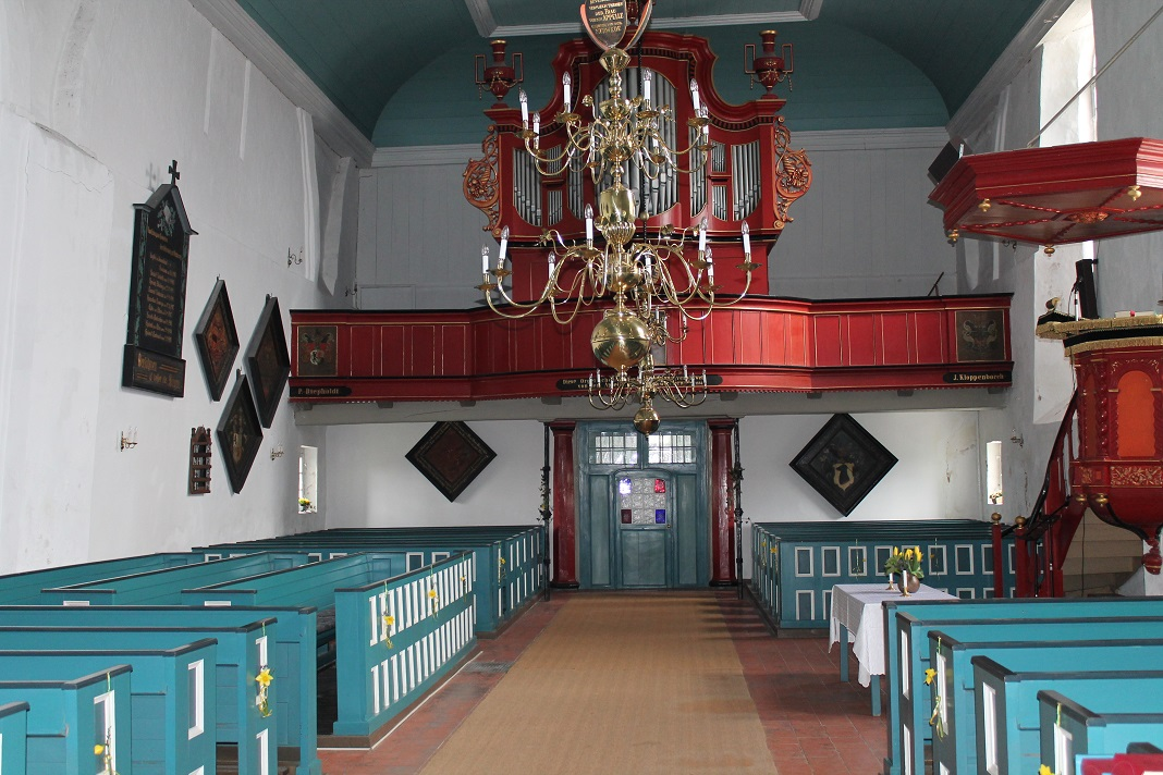 Innenraum der Groß Midlumer Kirche, Ostfriesland, Niedersachsen, Deutschland